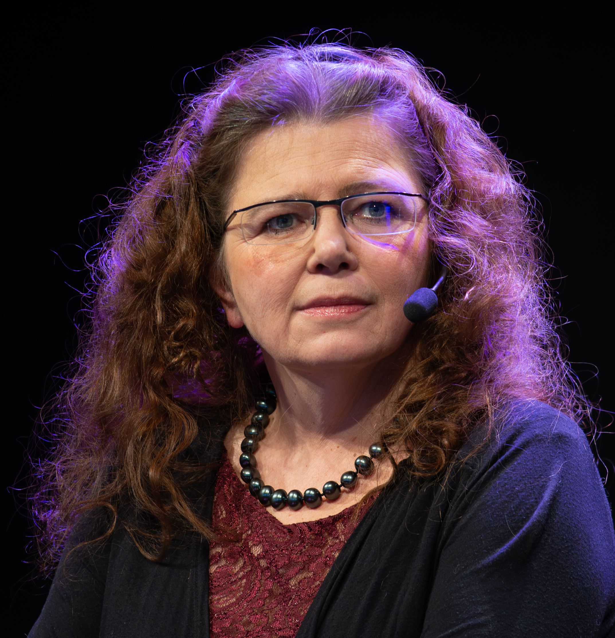 Heléne Lööw i en manifestation till stöd för hotade konstnärer och författare på Kulturhuset Stadsteatern i Stockholm den 14 februari 2015.